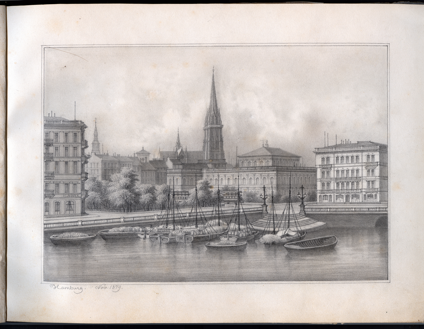 Im Vordergrund die Kleine Alster mit Booten, dahinter die Börse und im Hintergrund St. Nikolai